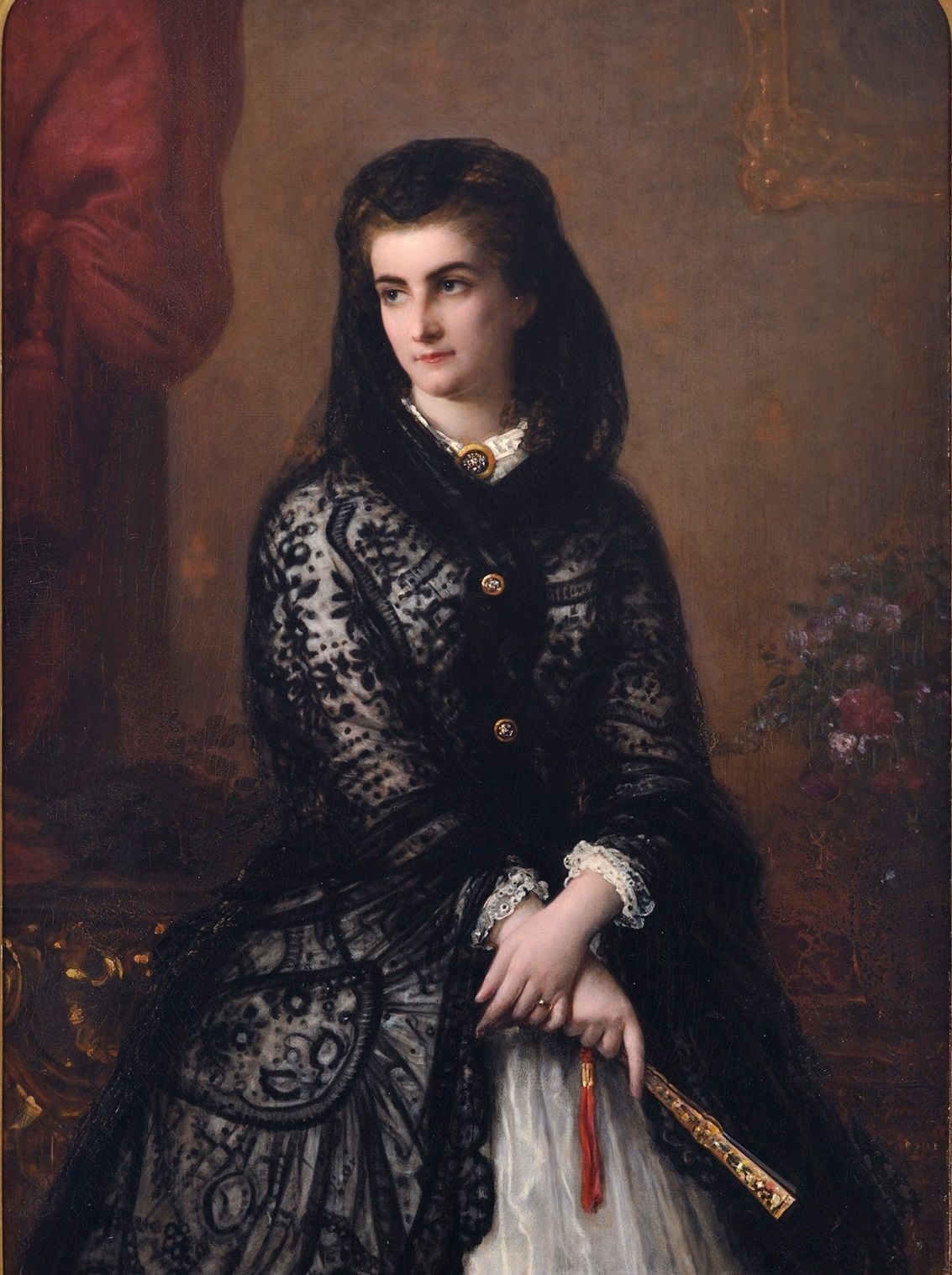 Maria Sofia di Baviera, regina di Napoli (1841–1925)